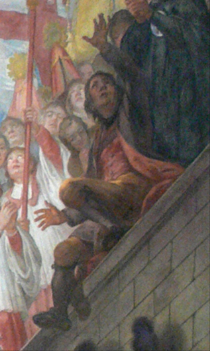 Bad Wurzach, Pfarrkirche St. Verena, Deckenfresko im Mittelschiff von Andreas Brugger Ostteil, zeigende Figur, eventuell Selbstporträt des Malers Andreas Brugger